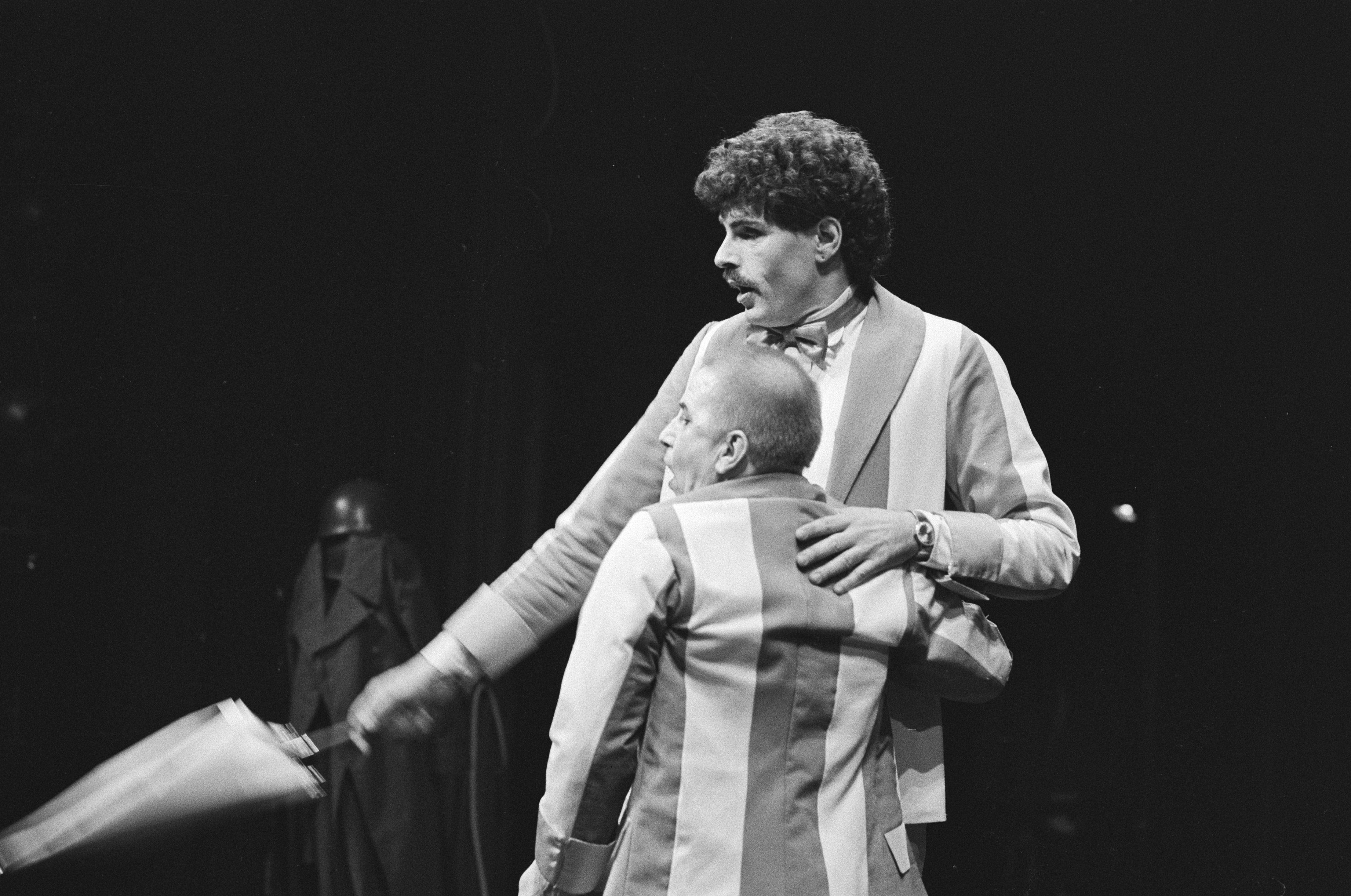 Collectie / Archief : Fotocollectie Anefo Reportage / Serie : [ onbekend ] Beschrijving : Robert Long en Leen Jongewaard tijdens try-out van programma "Tot hier toe heeft de Heere ons geholpen" in Carré in Amsterdam Datum : 12 februari 1982 Locatie : Amsterdam, Noord-Holland Trefwoorden : Try-out, cabaret Persoonsnaam : Jongewaard, Leen, Long, Robert Fotograaf : Bogaerts, Rob / Anefo Auteursrechthebbende : Nationaal Archief Materiaalsoort : Negatief (zwart/wit) Nummer archiefinventaris : bekijk toegang 2.24.01.05 Bestanddeelnummer : 931-9752